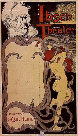 Lithographie de Frank Wedekind (1864-1918) - Théâtre Ibsen de Vienne, Autriche, juin 1898